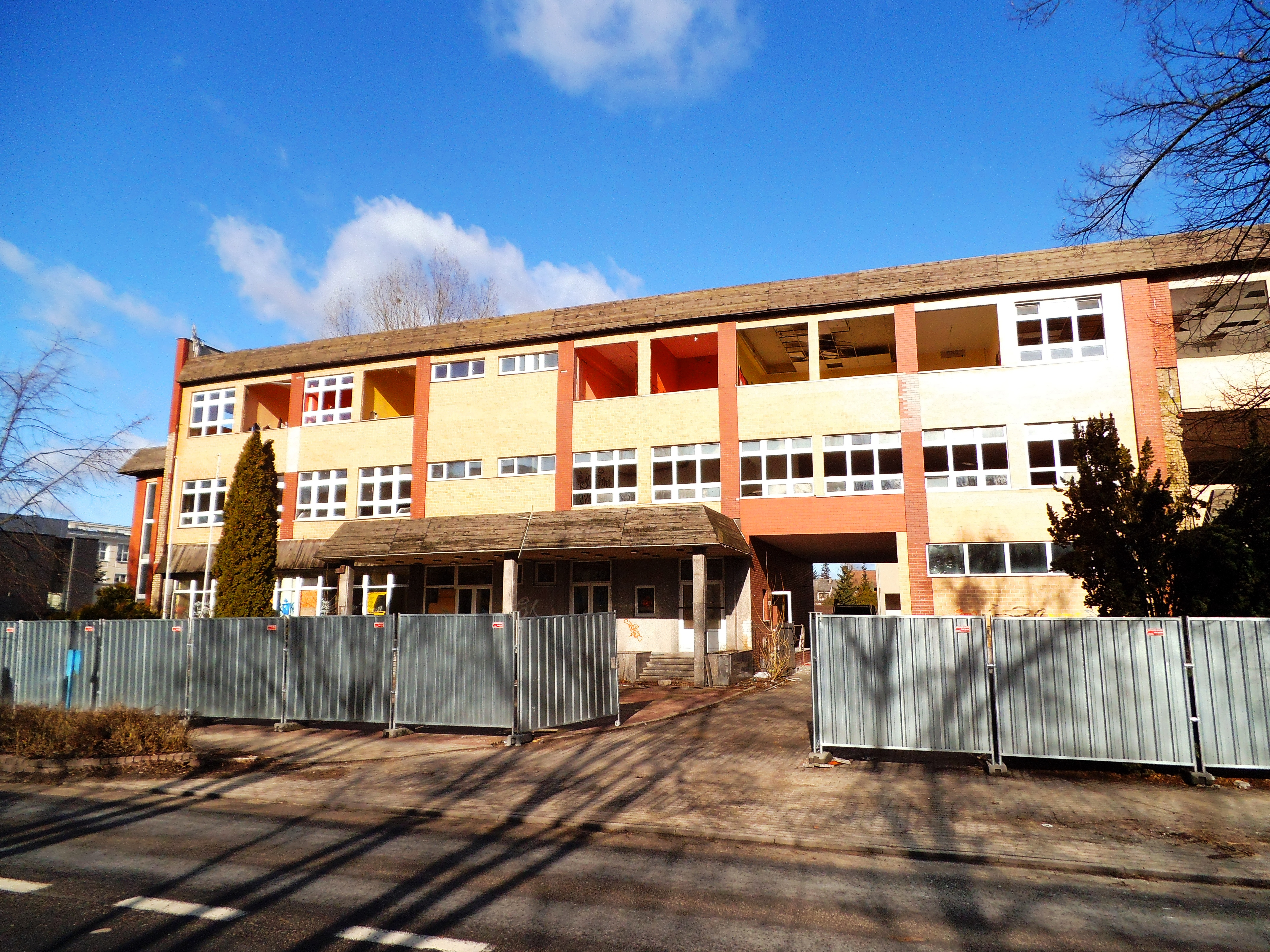 Torpo1 w Toruniu2019